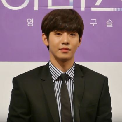 5월 3일 오후 서울시 강남구 임피리얼 팰리스 서울에서 tvN 새 월화드라마 '어비스 : 영혼 소생 구슬' 제작발표회가 열려 배우 안효섭이 질문에 답변을 하고 있다.